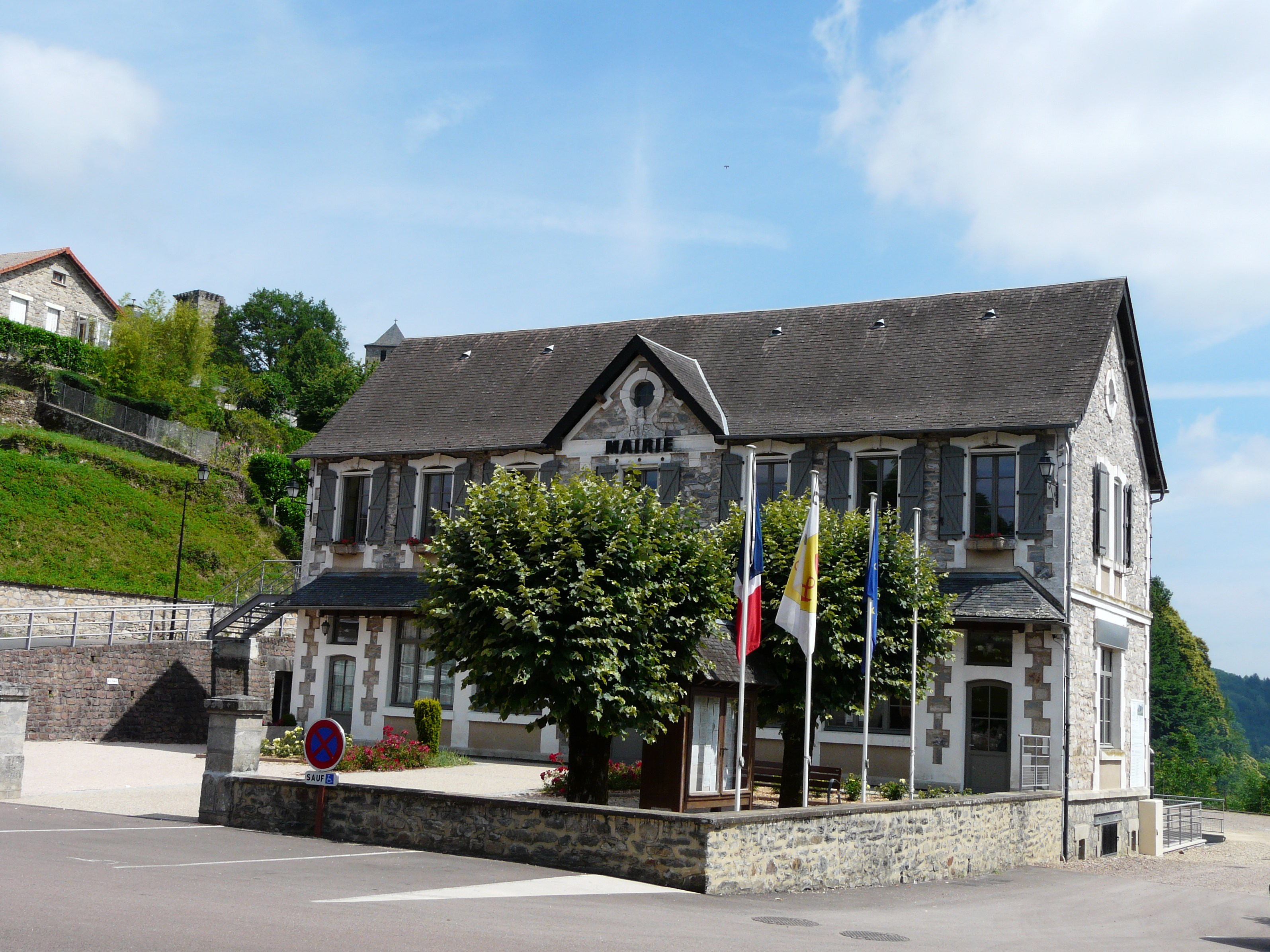 La mairie de Cornil, Corrèze, France.